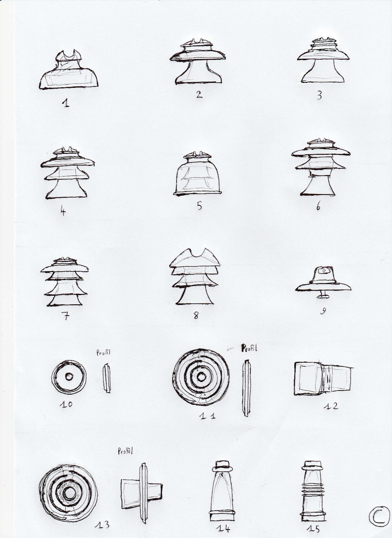 Croquis montrant les principaux types d'isolateurs haute-tension qui furent produits au XXe siècle.